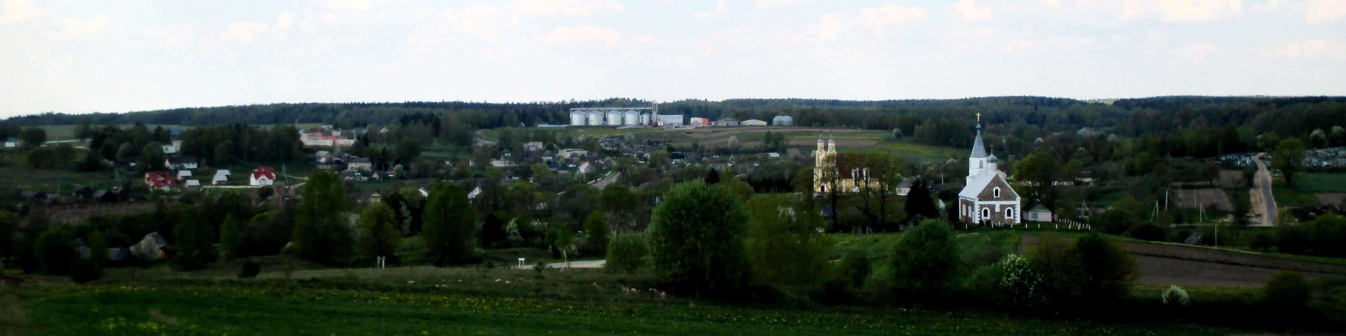 Крэва, Беларусь. Від на мястэчка з усходу